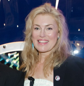 Актриса Мария Шукшина на ежегодной вечеринке InStyle Beauty Bar. Май, 2013 год.